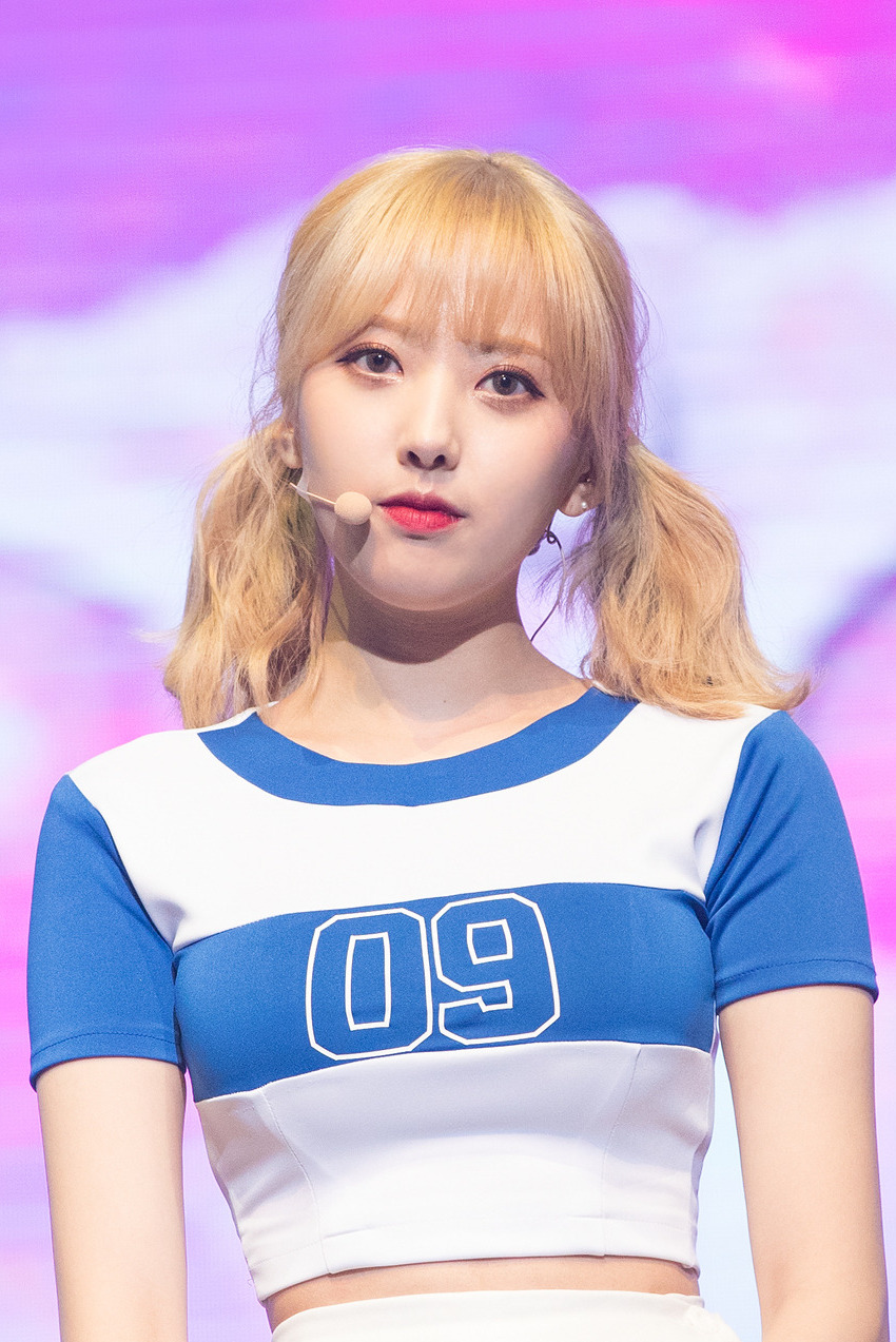 [18.03.03] 유니티 팬미팅 직찍 ( 유니티 더유닛 우희 윤조 )